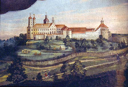 Historische Ansicht des Schloss ob Ellwangens (Linkes Seitenaltarblatt (Ausschnitt), Ansicht Schloss und Stadt Ellwangen, 1627)